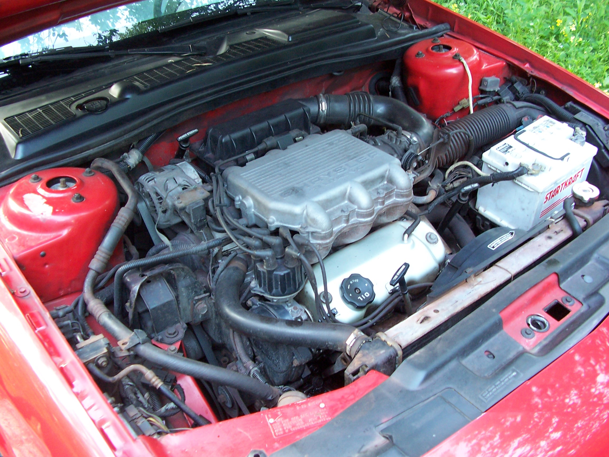 Silnik Chrysler/Mitsubishi 3.0 V6 6G72 w Dodge Daytona ES z 1990r